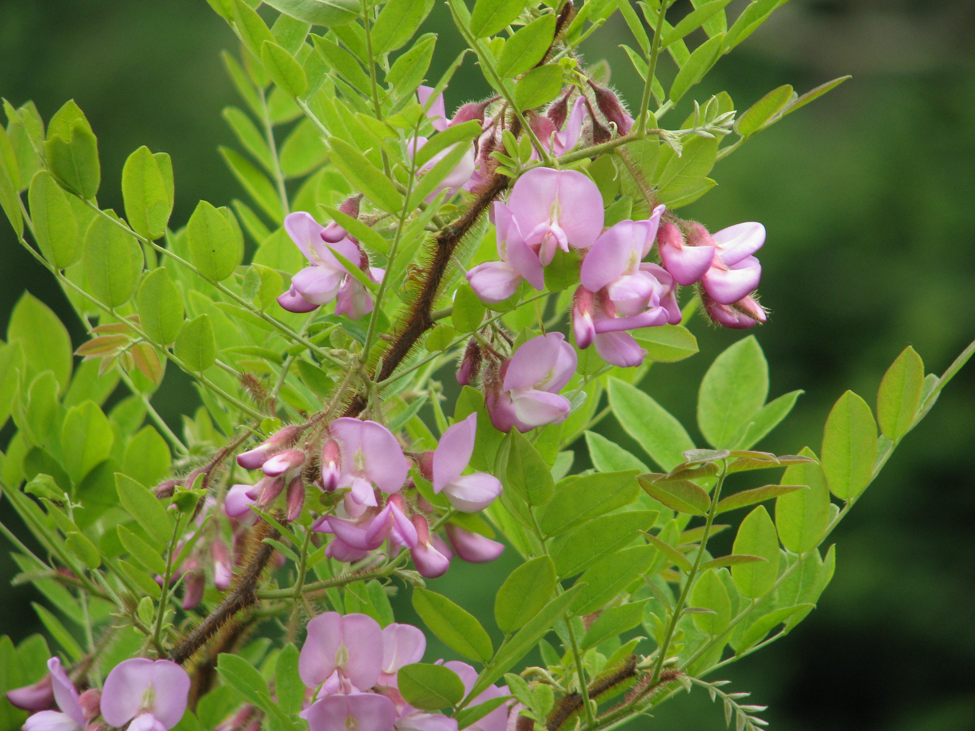 Robinia fertilis Robinia hispida var. fertilis